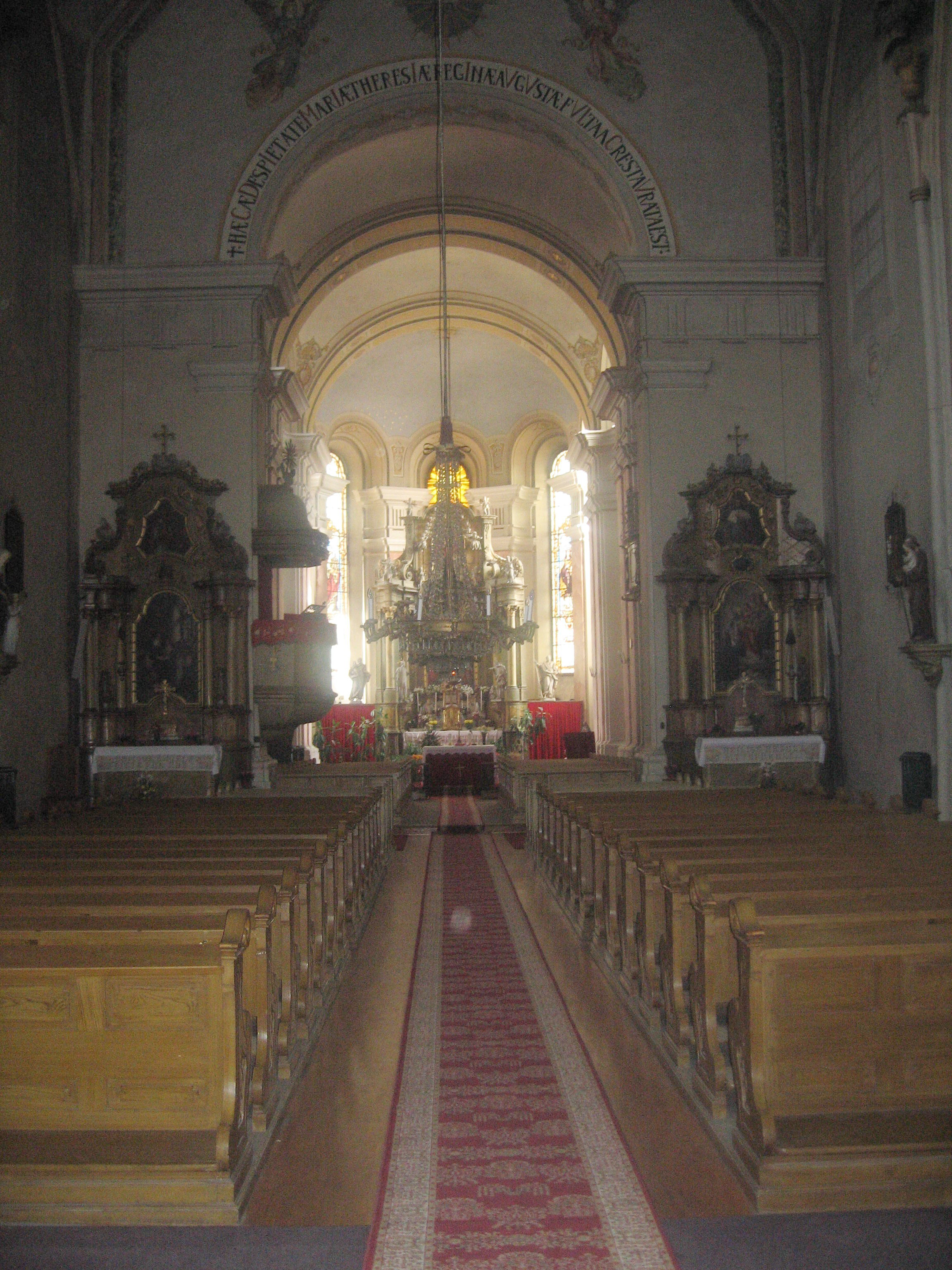 Biserica ursulinelor din Sibiu 01